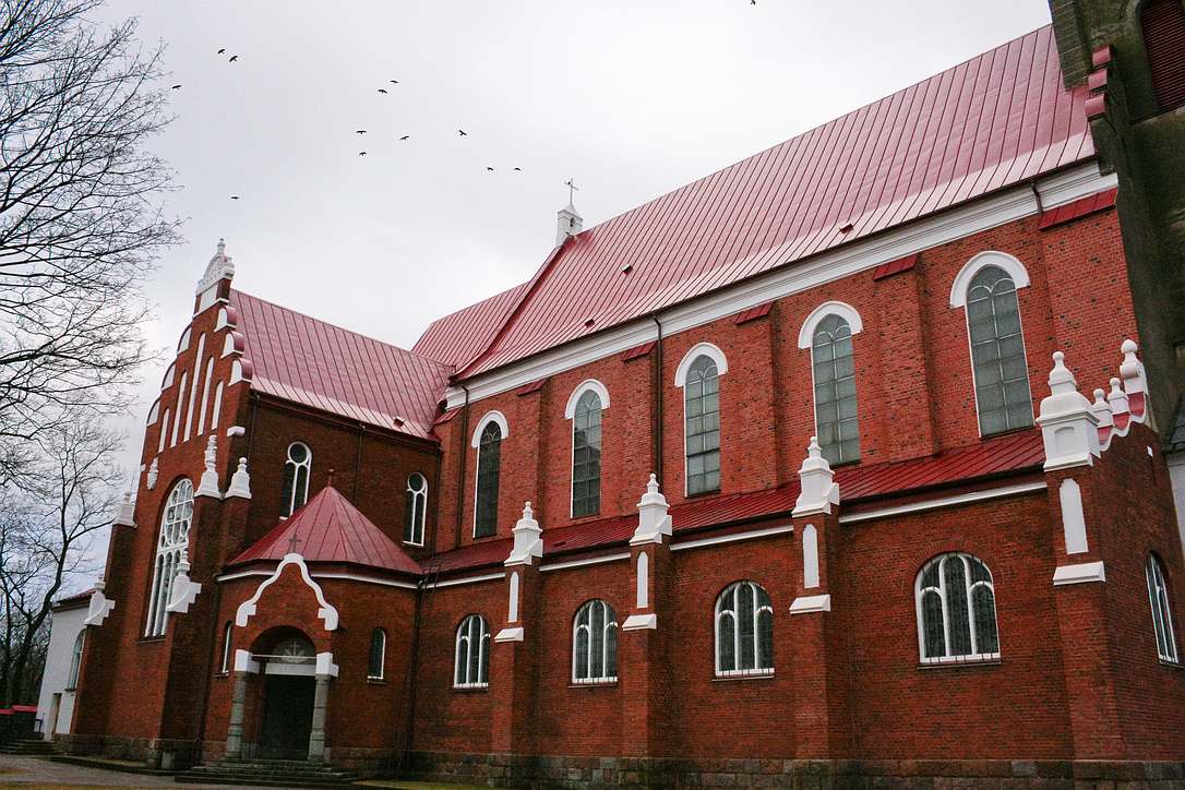 Kretingos bažnyčios šoninis fasadas